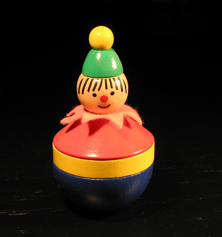 Bildbeschreibung: Stehaufmännchen Quelle/Source: Eigenaufnahme/Self-made Fotograf/Photographer: Beni Dauth, Wongx Datum: 12. Februar 2006